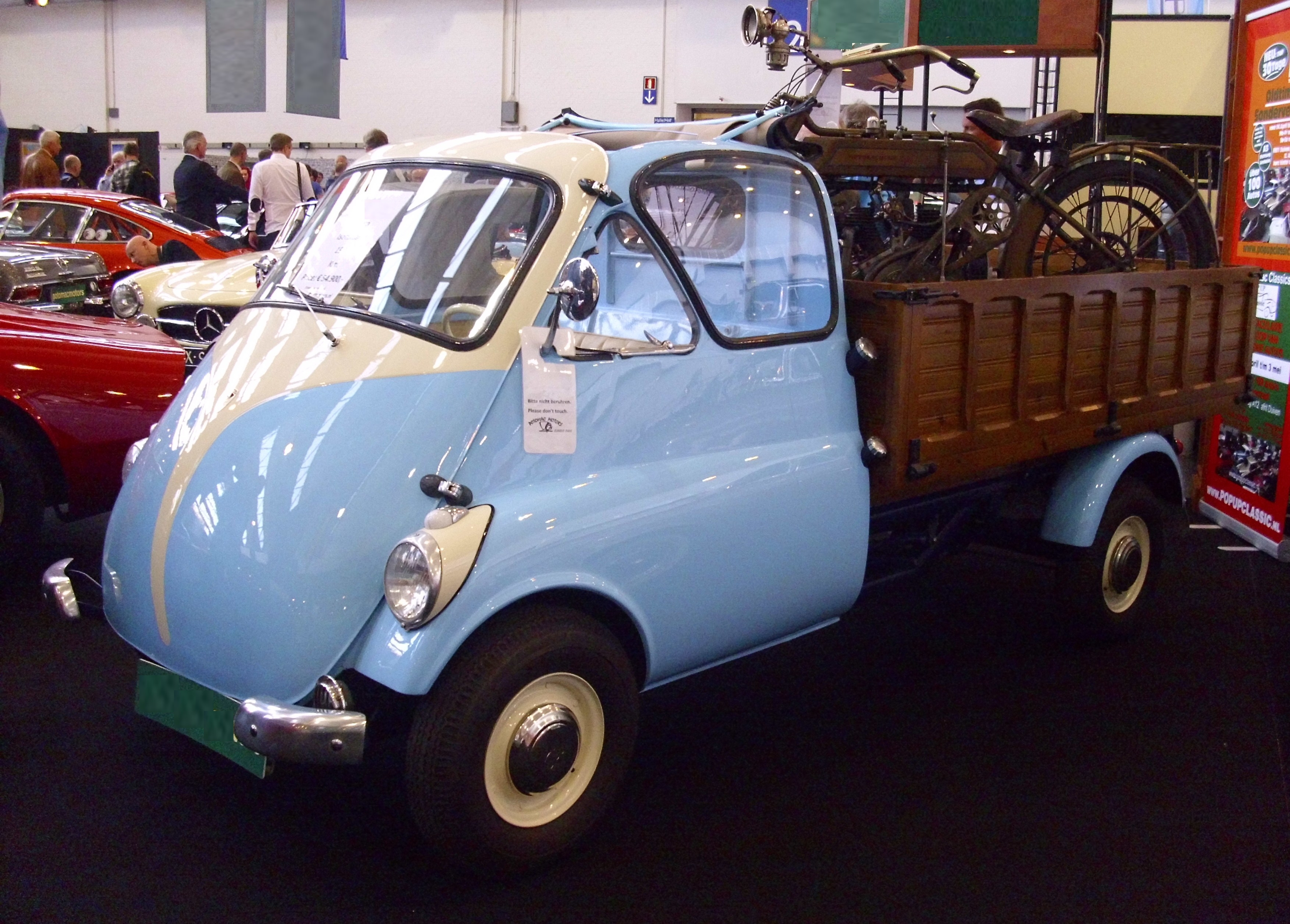 Iso Espana Isettacarro 1959